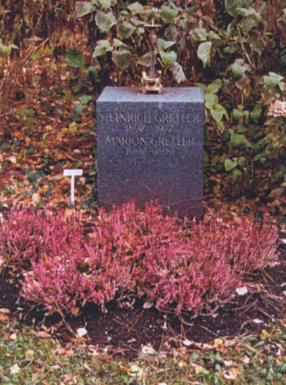 Friedhof Enzenbühl-Heinrich Gretler